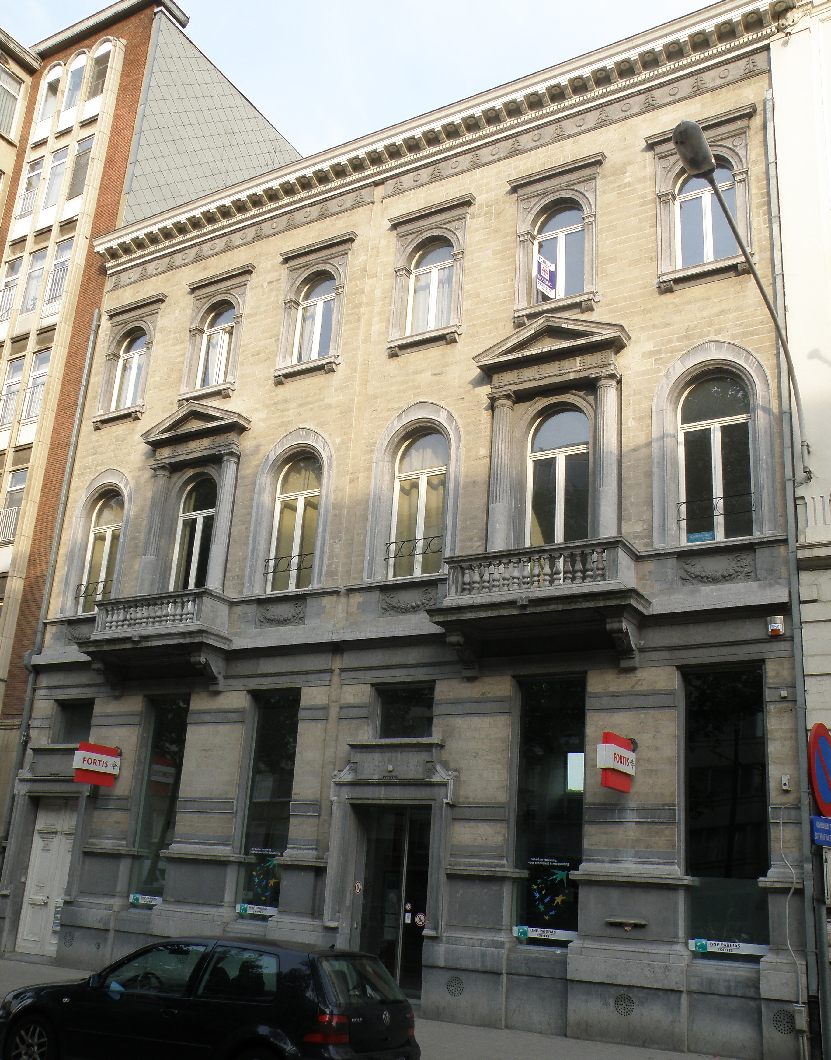 Anvers, Belgique. Ensemble de deux maisons identiques, de style néo-Renaissance florentine, sis aux n° 95 et 97 de la Belgiëlei. Architecte : Ernest Stordiau, 1889.